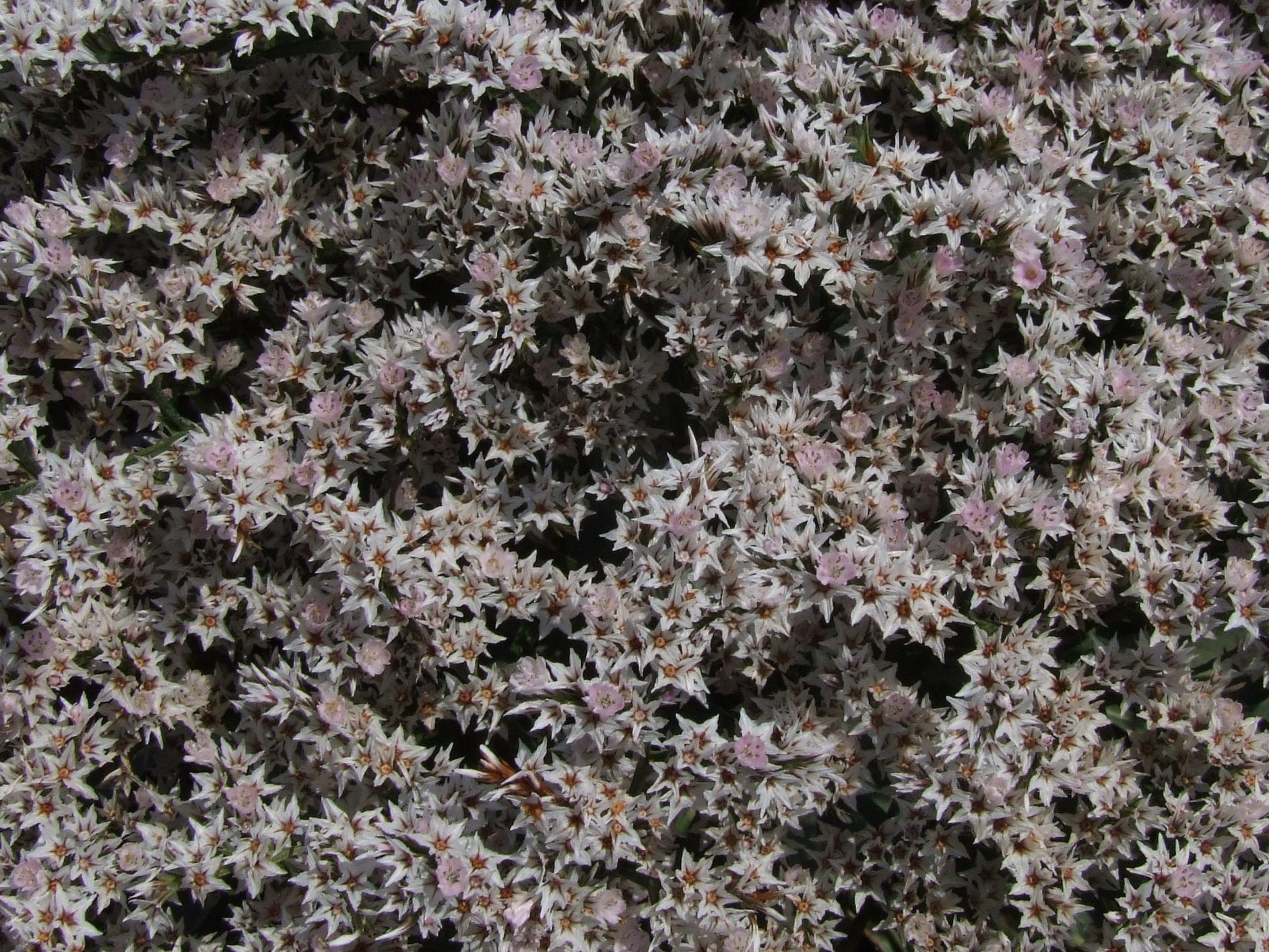 Goniolimon_tataricum (pl. suchorośl tatarski)